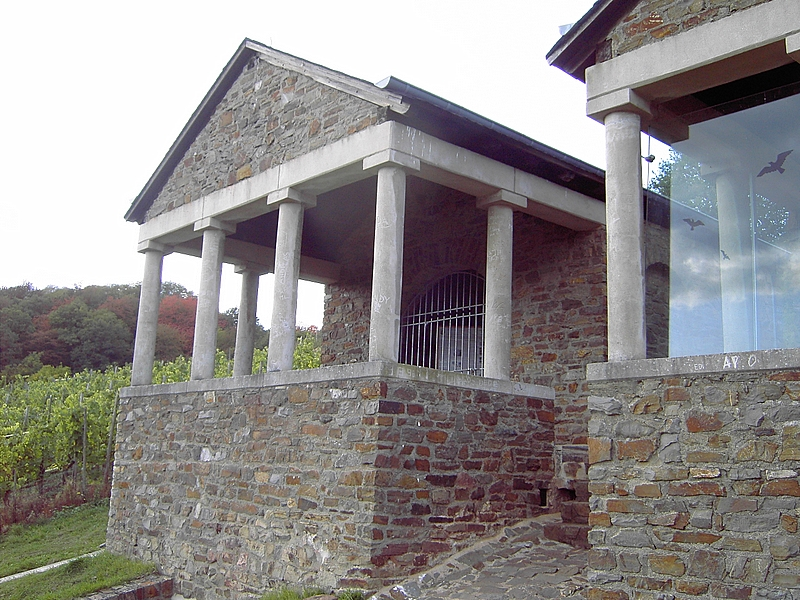 Römergrab bei Nehren (Mosel)